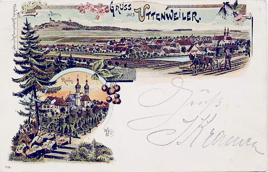 Uttenweiler Postkarte von 1900